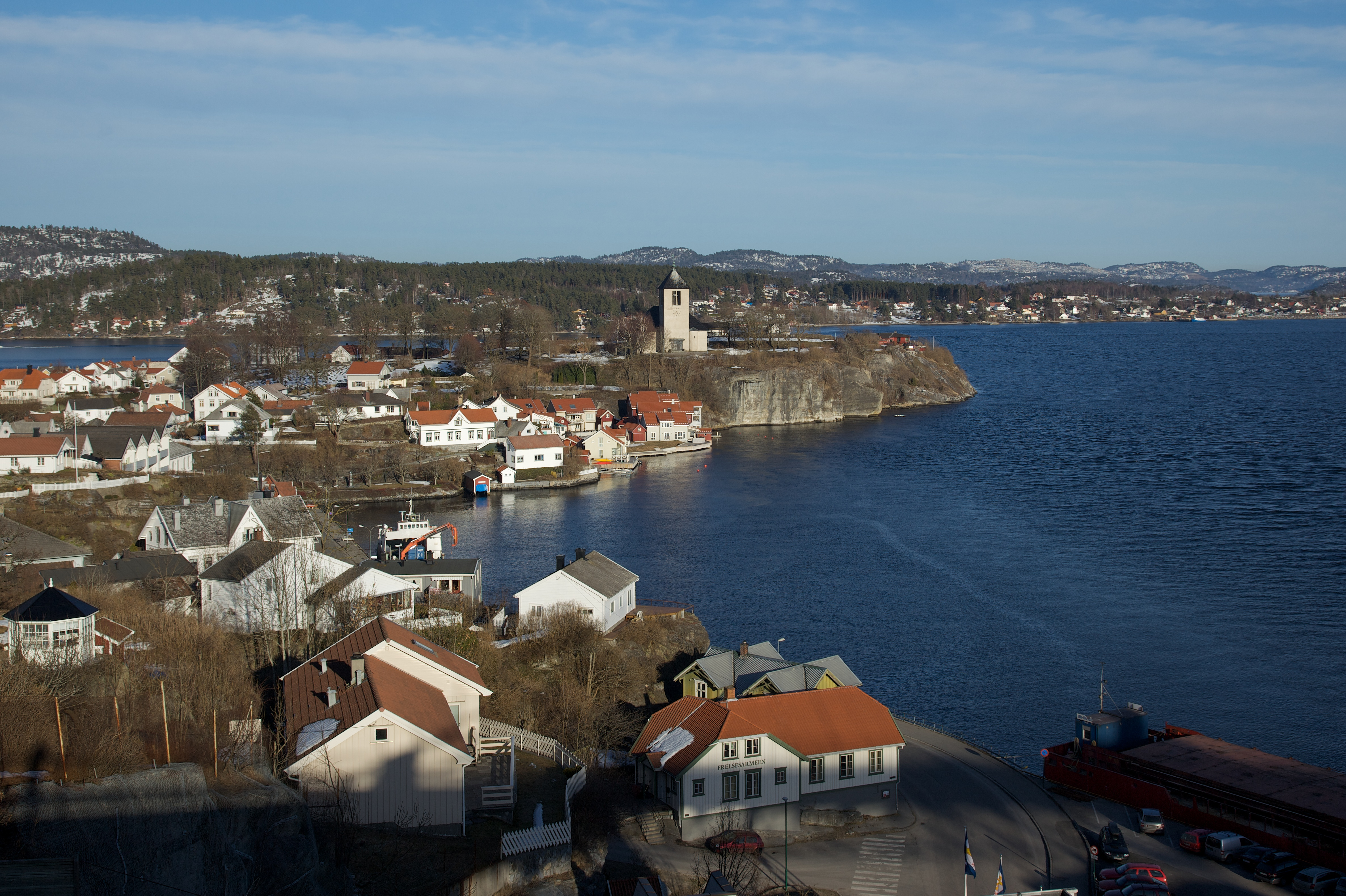 Brevik